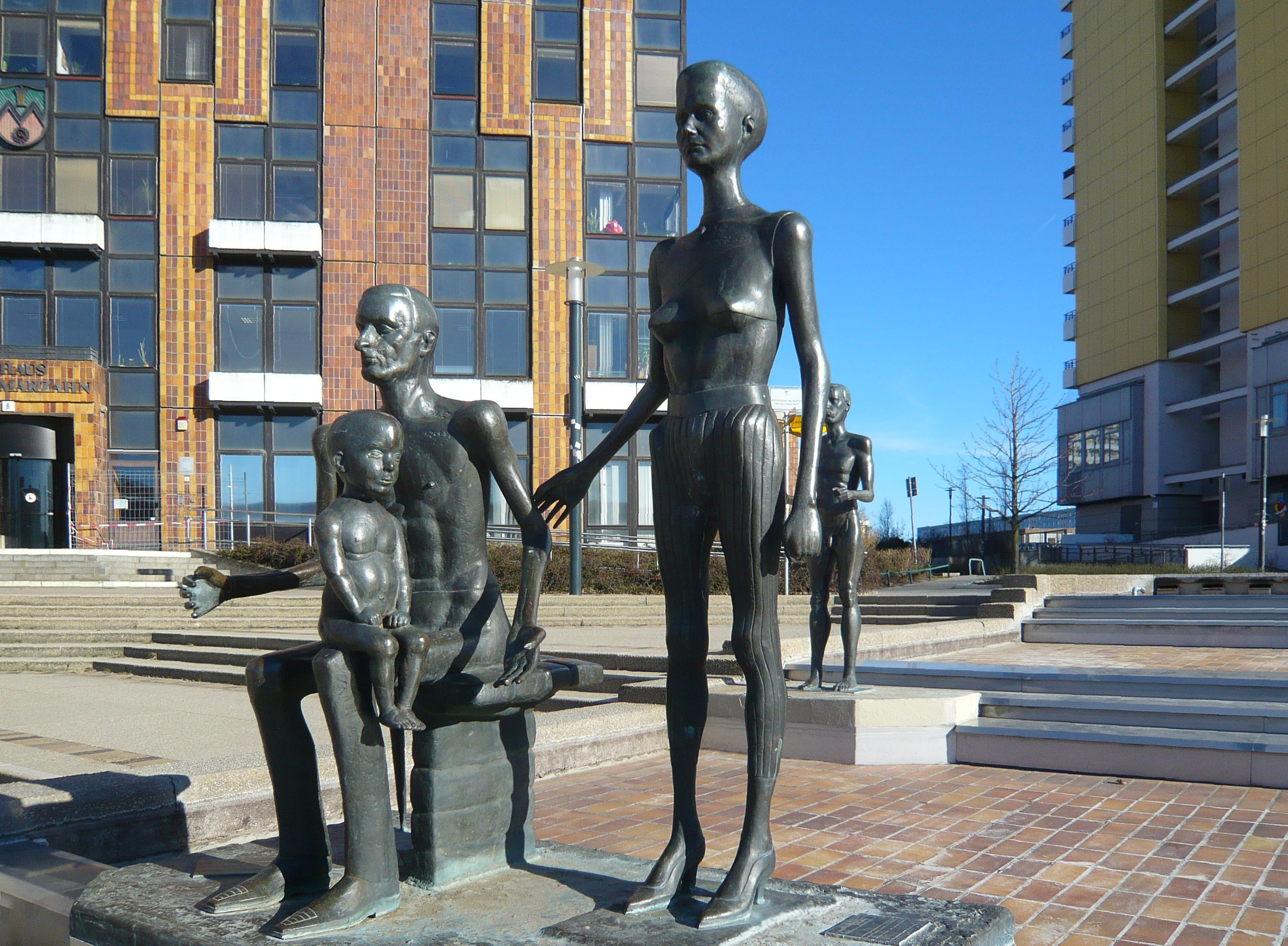 Ortsteil Berlin-Marzahn: Helene-Weigel-Platz, Brunnen (=Familie +Denker)